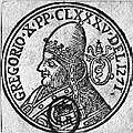 afbeelding oude munt wegens ouderdom PD